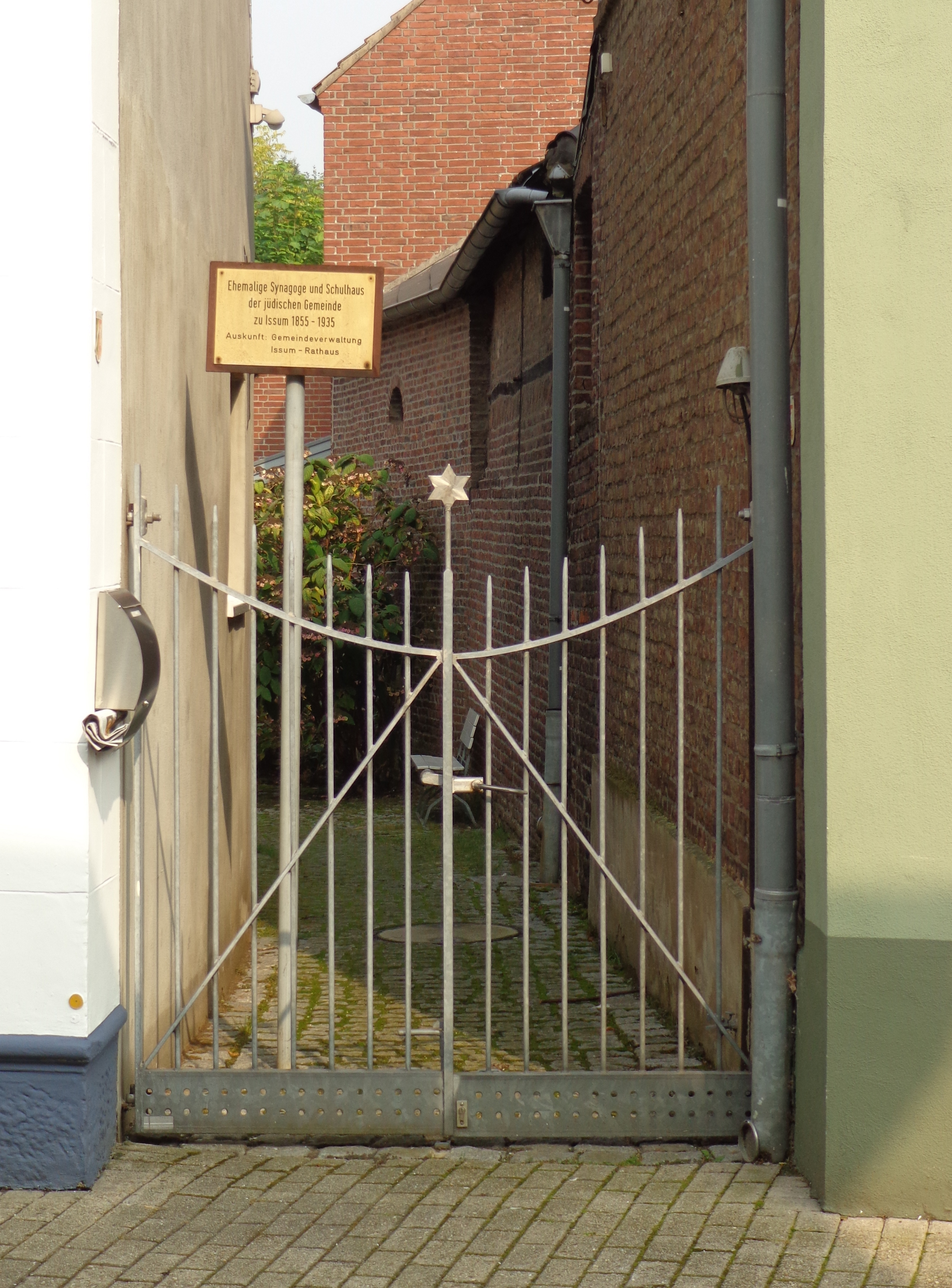 Ehem. Synagoge und jüdisches Gemeindehaus This is a photograph of an architectural monument.